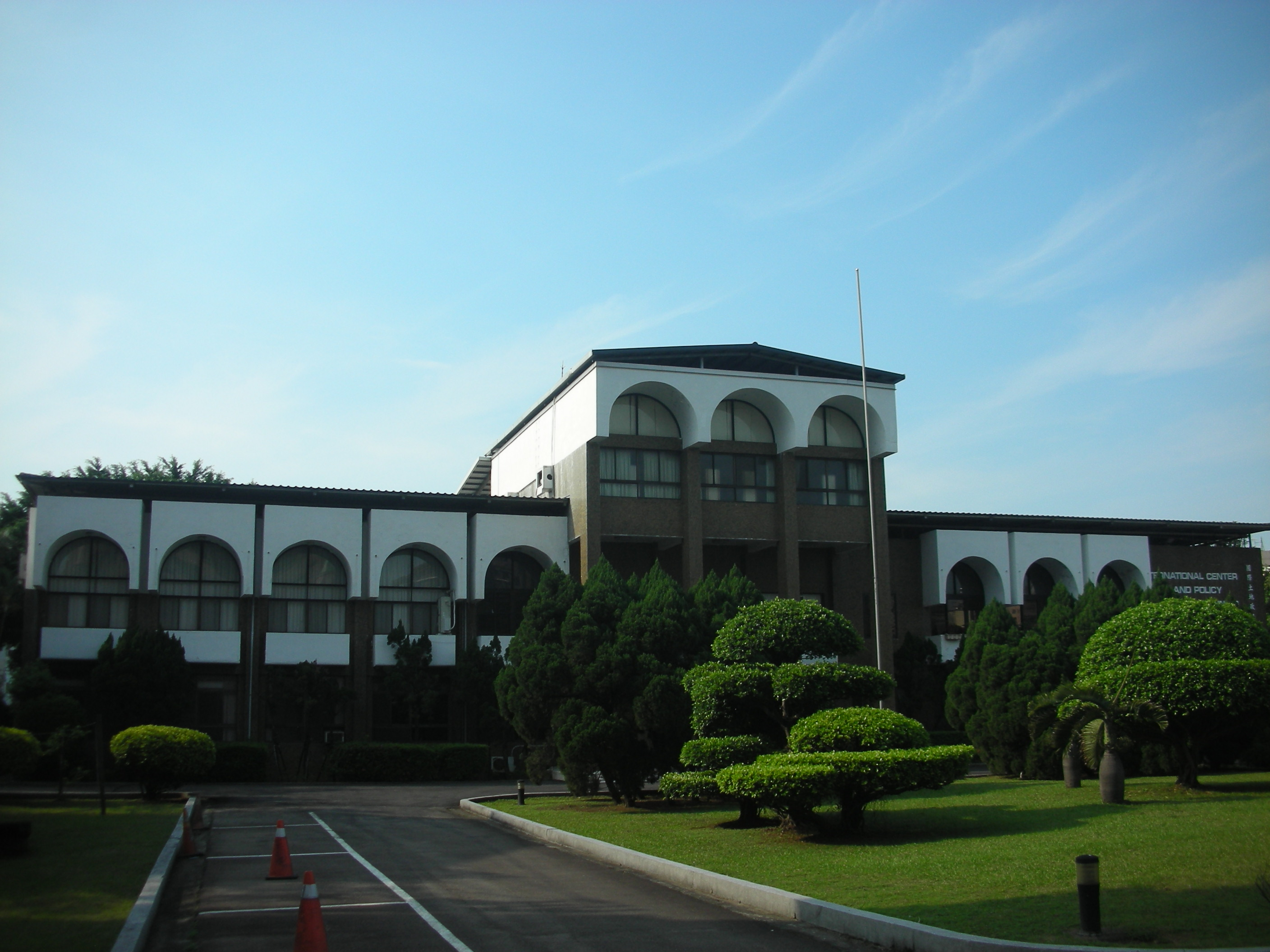 國際土地政策研究訓練中心是位於台灣桃園市的研究機構，上級機關為中華民國行政院農業委員會，前身為1968年成立的土地改革訓練所，當時由我國政府與及美國林肯土地政策學會共同成立，2000年更名為現名。